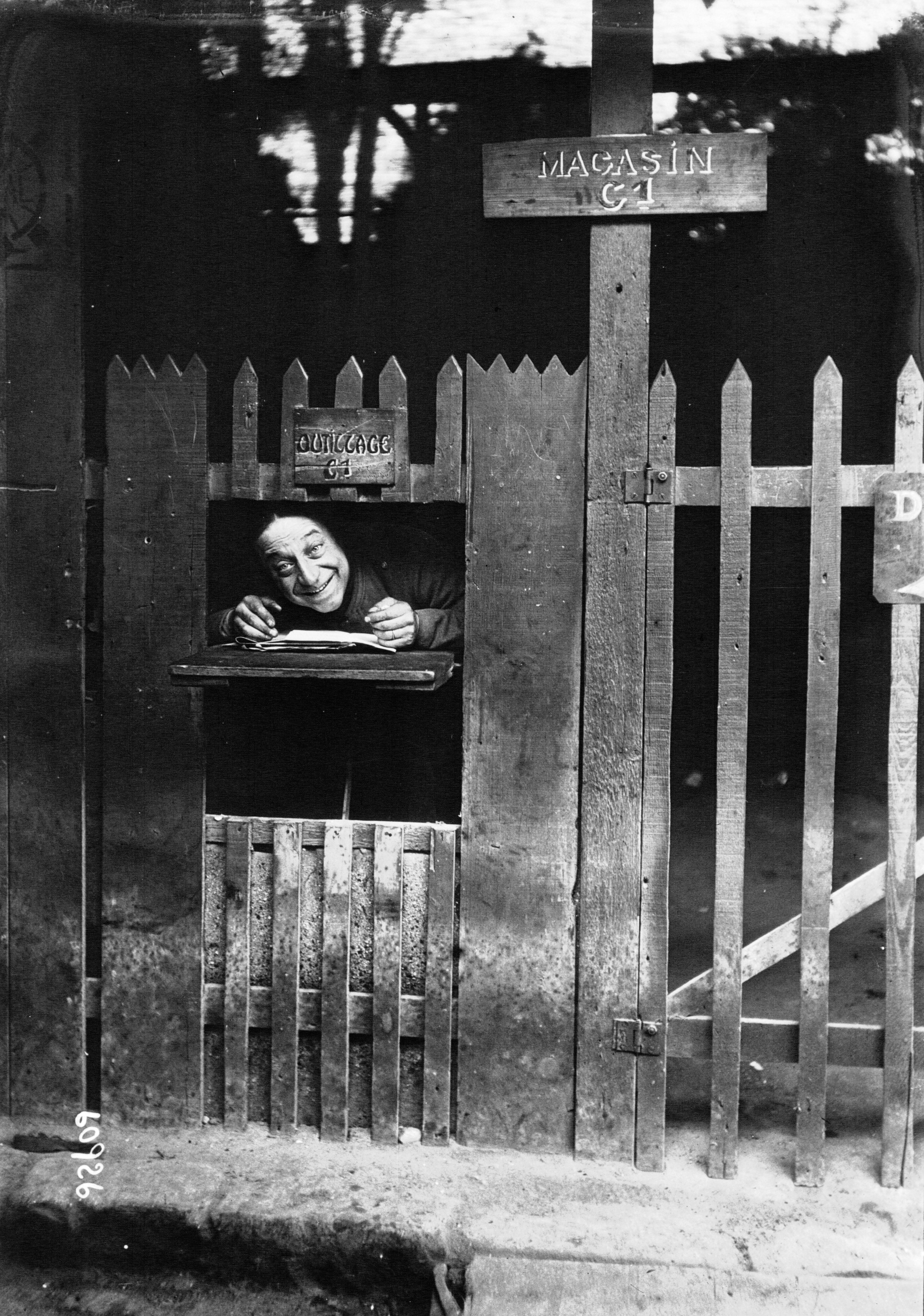 L'Ecole des tracteurs militaires en terrain difficile, le comique Dorville magasinier au parc automobile de Boulogne : photographie de presse